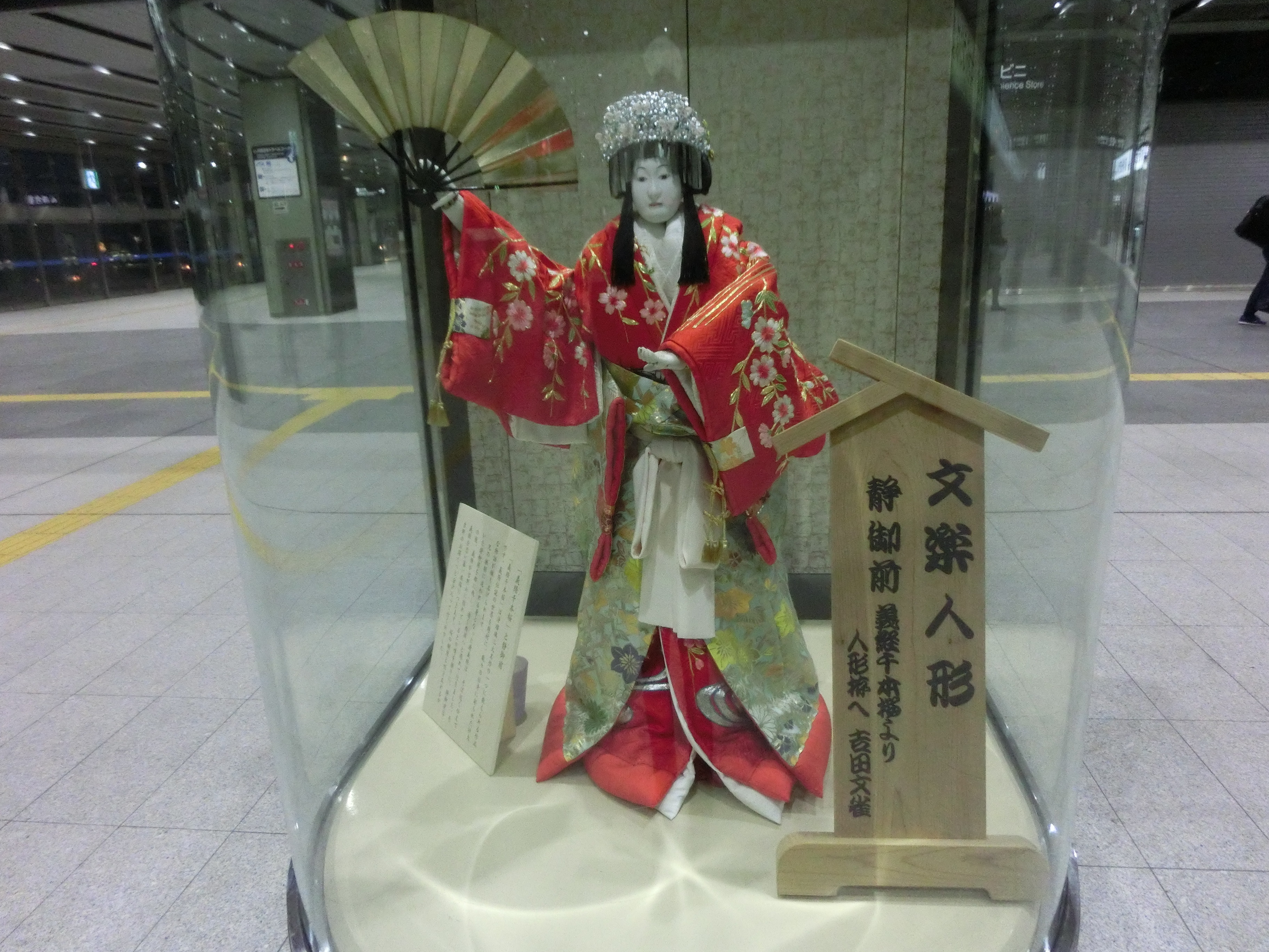 文楽人形（新大阪駅）